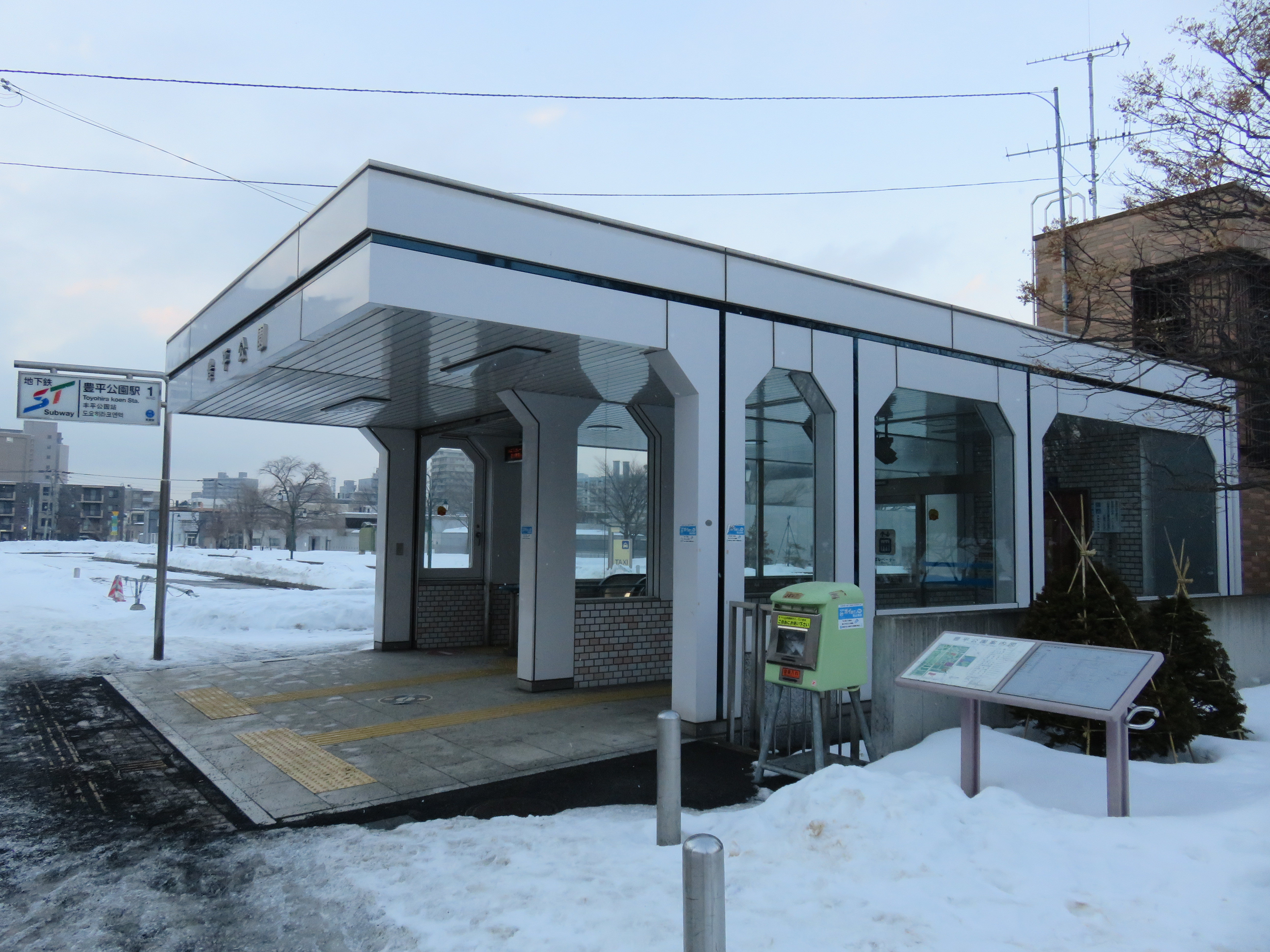 豊平公園駅1番出入口